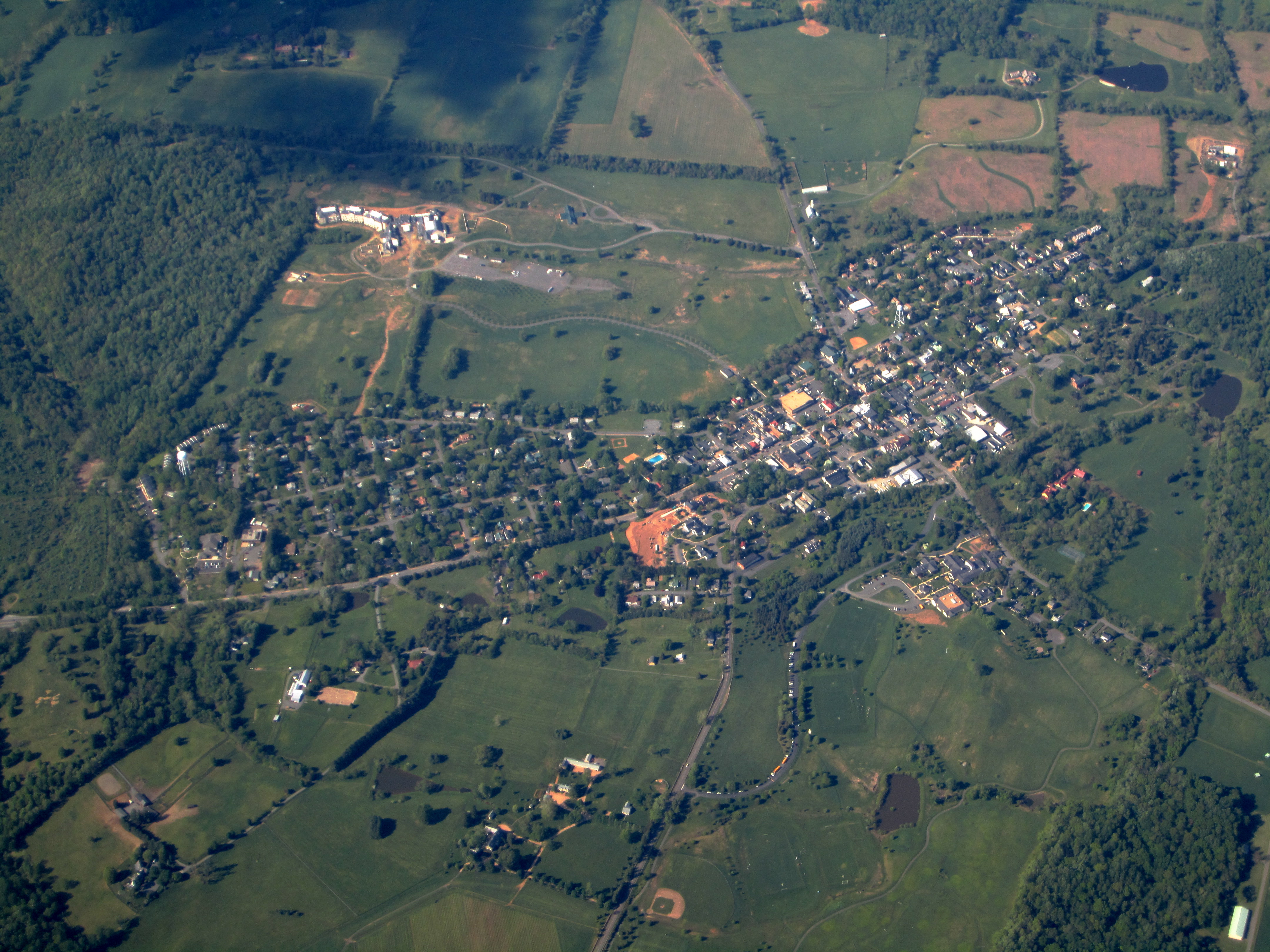 Middleburg, Virginia